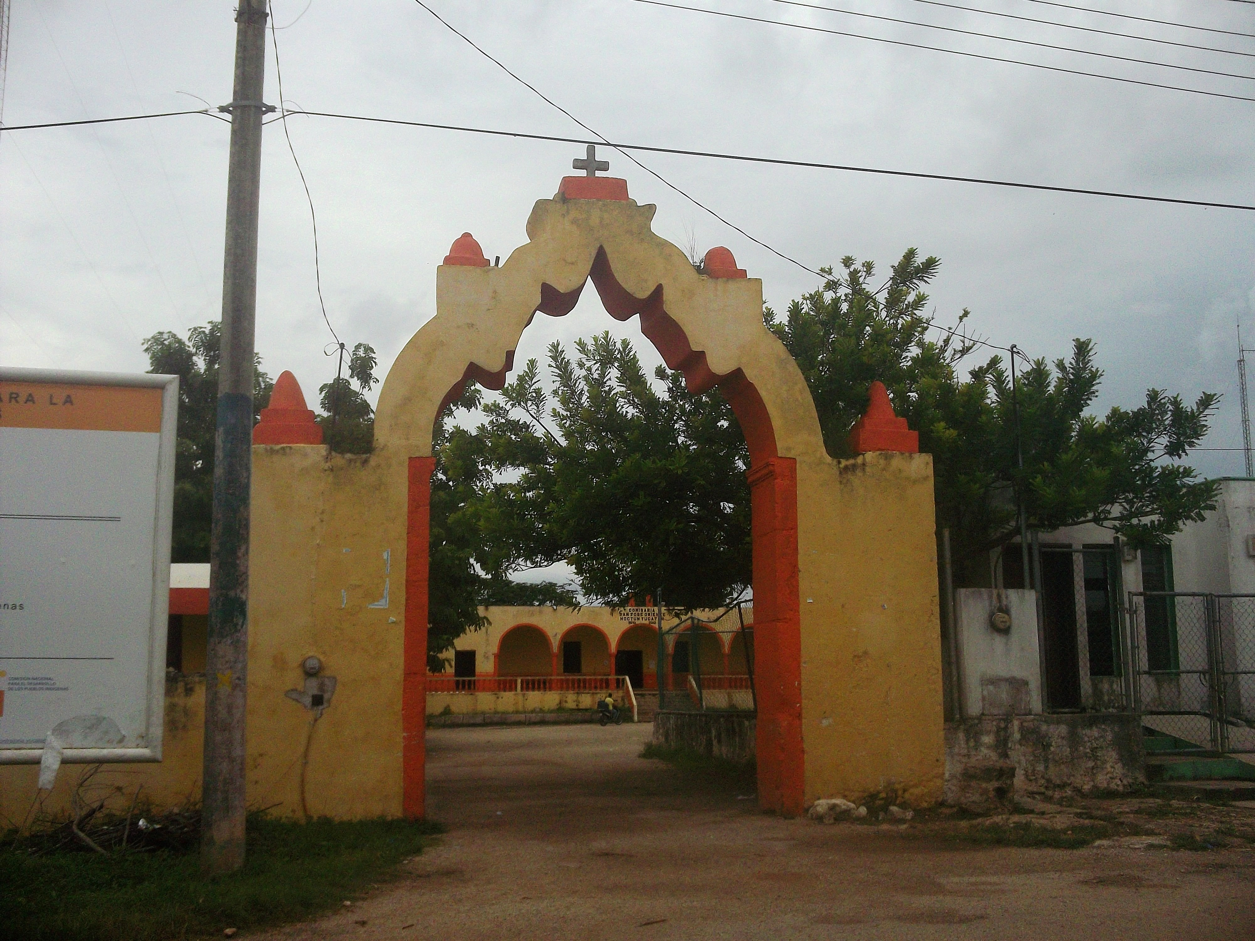 Casa comisarial de San José Oriente, Yucatán.